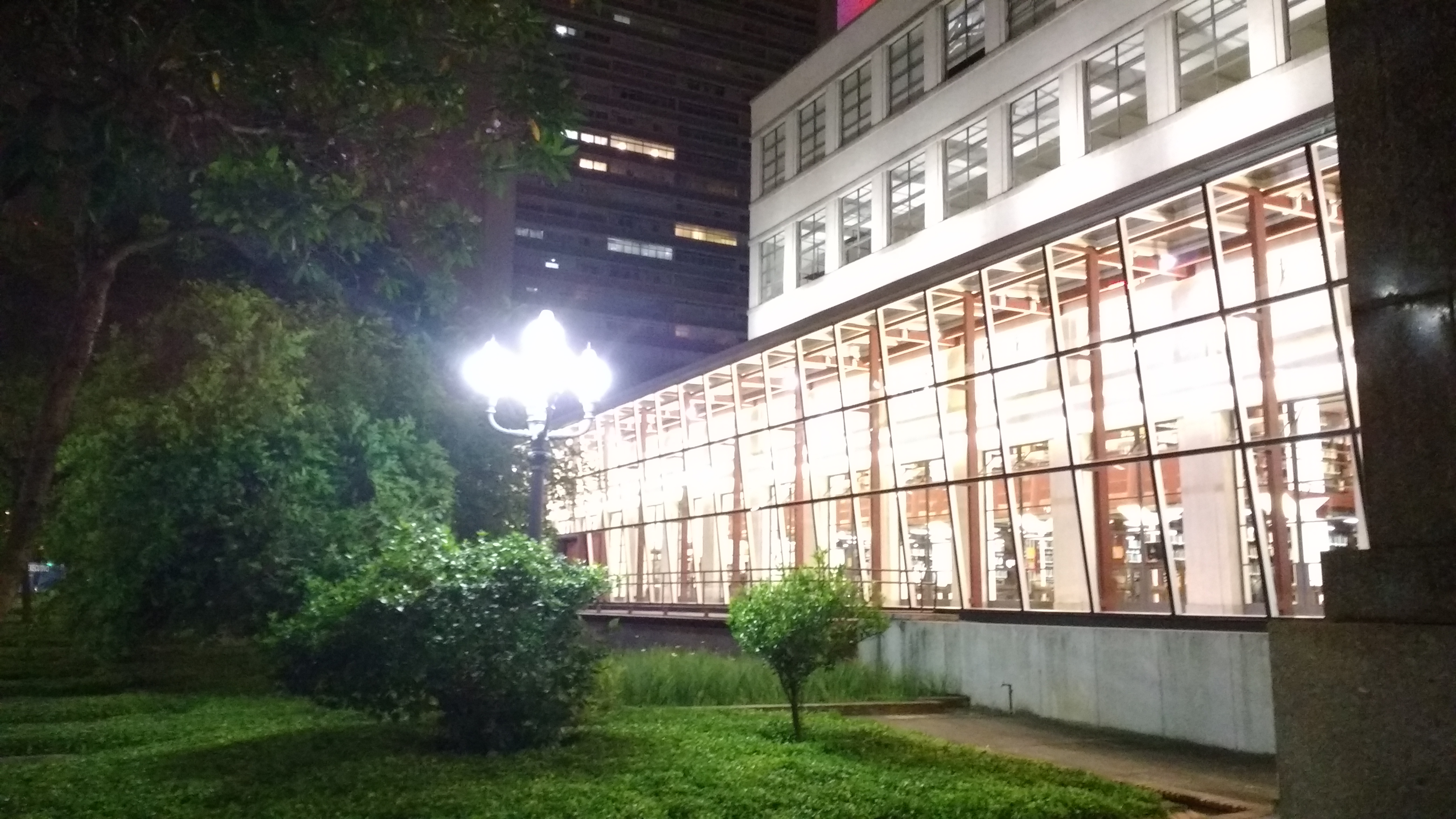 Conjunto do Ipiranga: Museu Paulista, Monumento à Independência, Casa do Grito e Parque da Independência